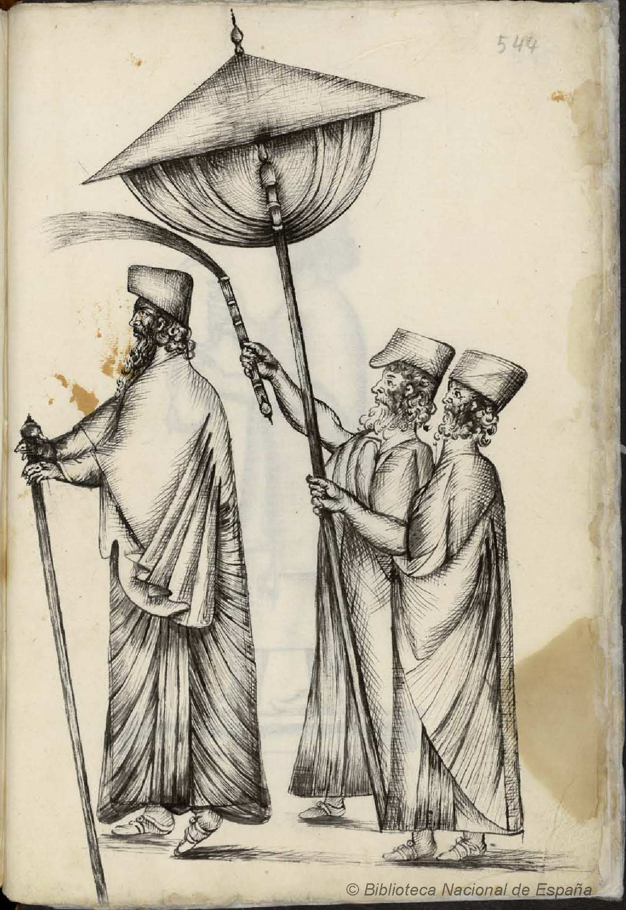 Comentarios de don García de Silva que contienen su viaje a la India y de ella a Persia, dibujo a pluma contenido en el manuscrito de García de Silva conservado en la Biblioteca Nacional de España